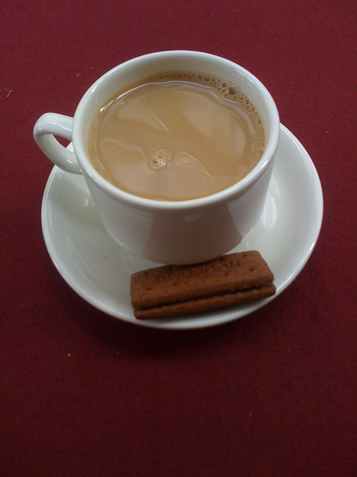 .. I missed breakfast, bah.